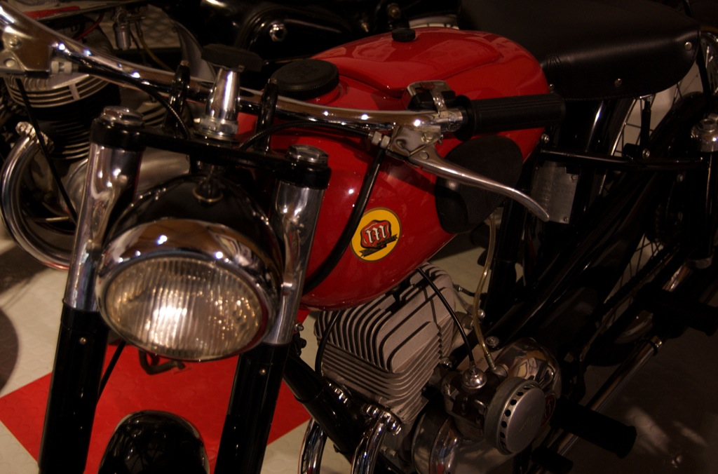 A Montesa D-51 (1951-53)